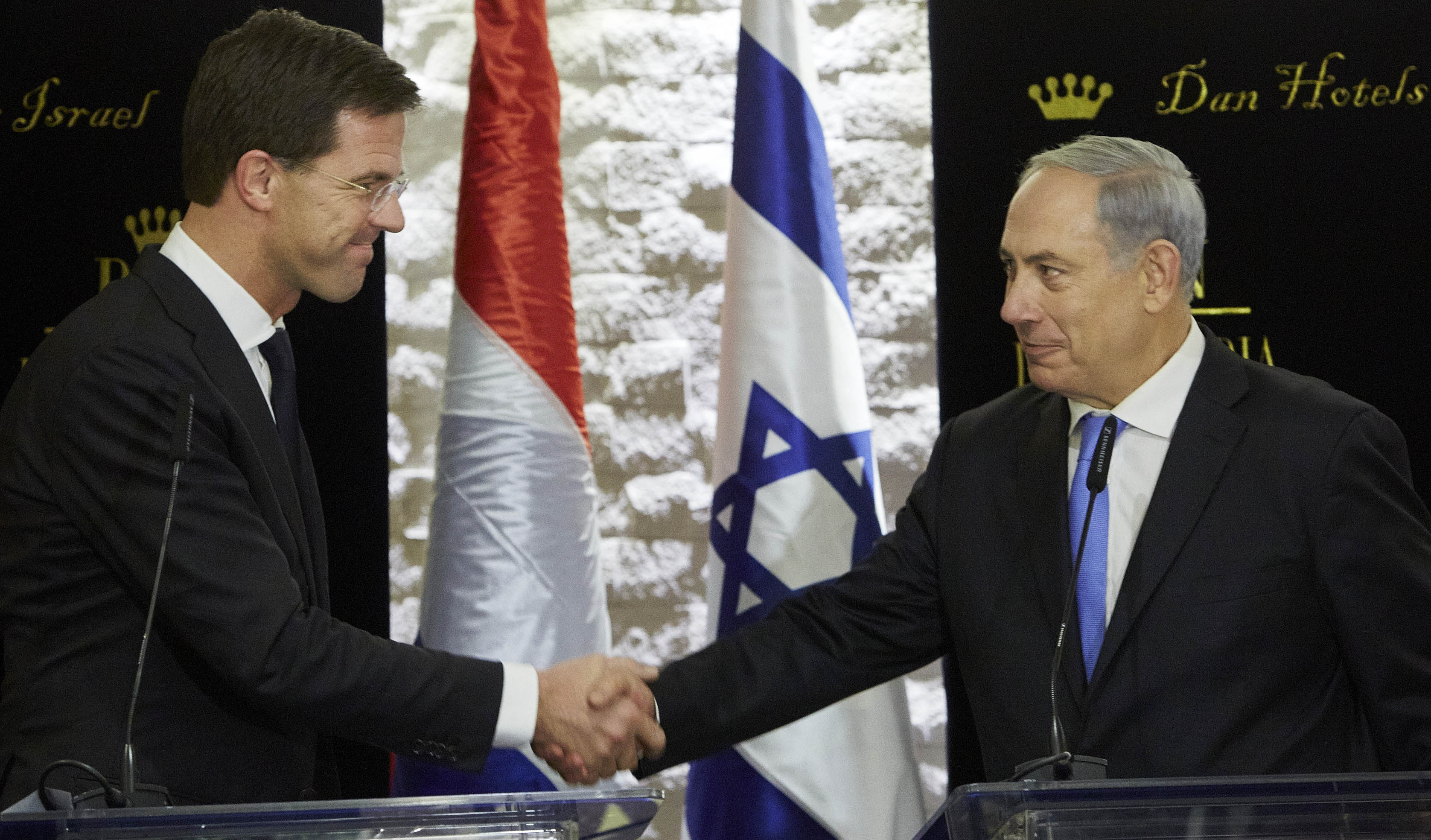 Minister-president Rutte sprak zondag met zijn Israëlische ambtgenoot Netanyahu.